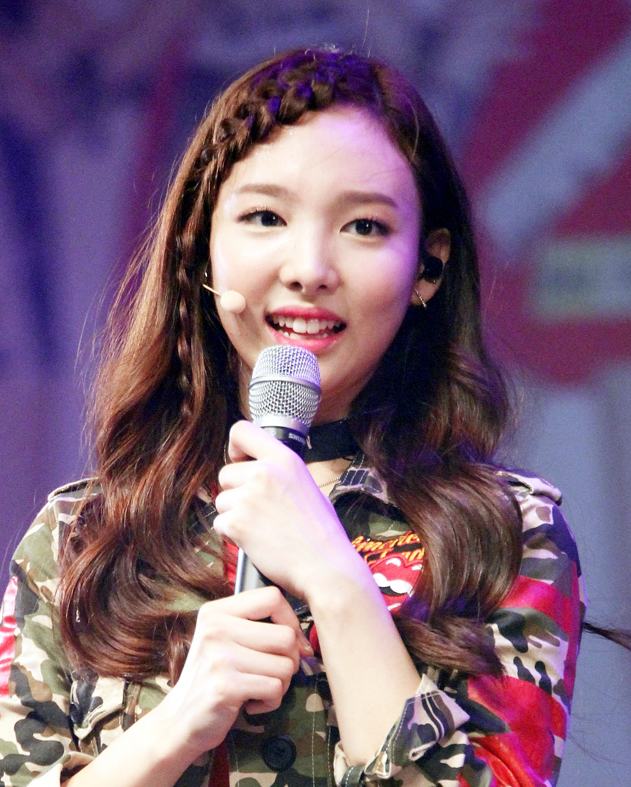 151020 트와이스 - 데뷔 쇼케이스 TWICE - Debut Showcase